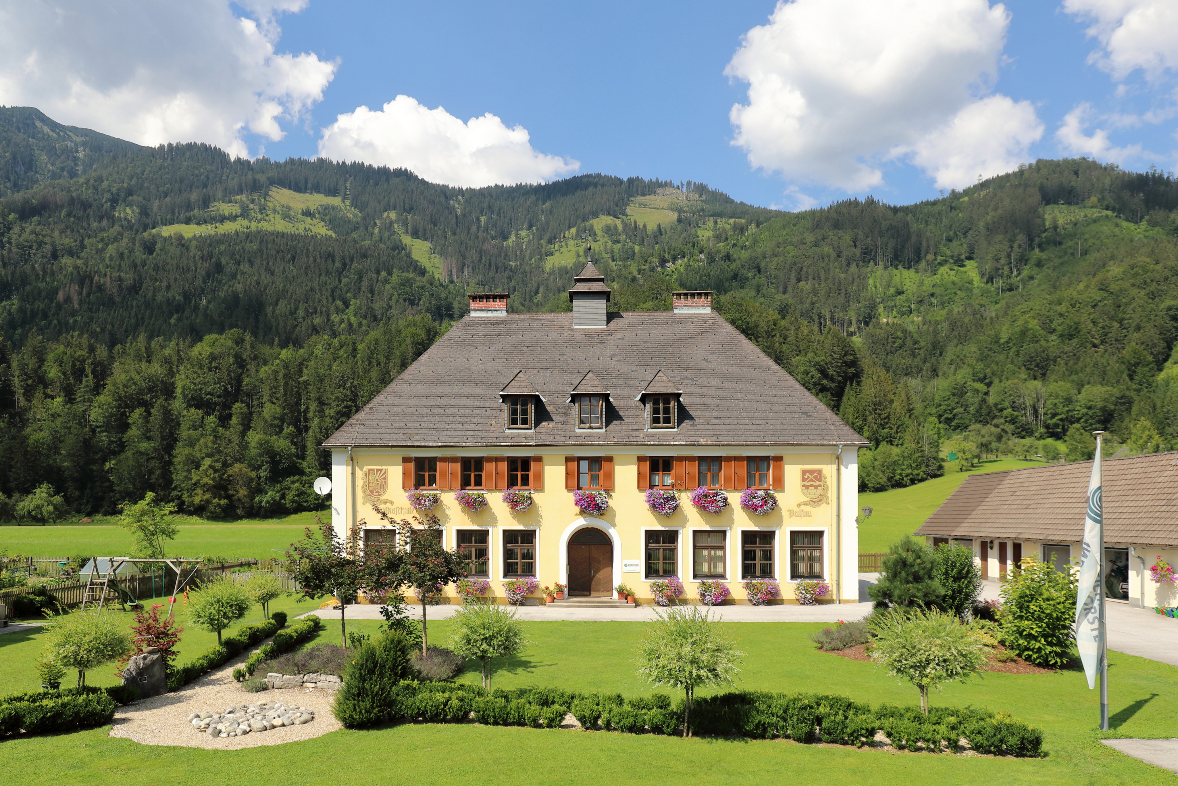 Südansicht der Volksschule in Palfau, ein Ortsteil der steiermärkischen Gemeinde Landl.Palfau ist eine Ortschaft, Katastralgemeinde und ehemalige Gemeinde mit rd. 400 Einwohnern (Stand: 2014). Im Rahmen der steiermärkischen Gemeindestrukturreform 2015 sind die Gemeinden Gams bei Hieflau, Landl und die (vorher im Bezirk Leoben liegende) Gemeinde Hieflau zusammengeschlossen worden.